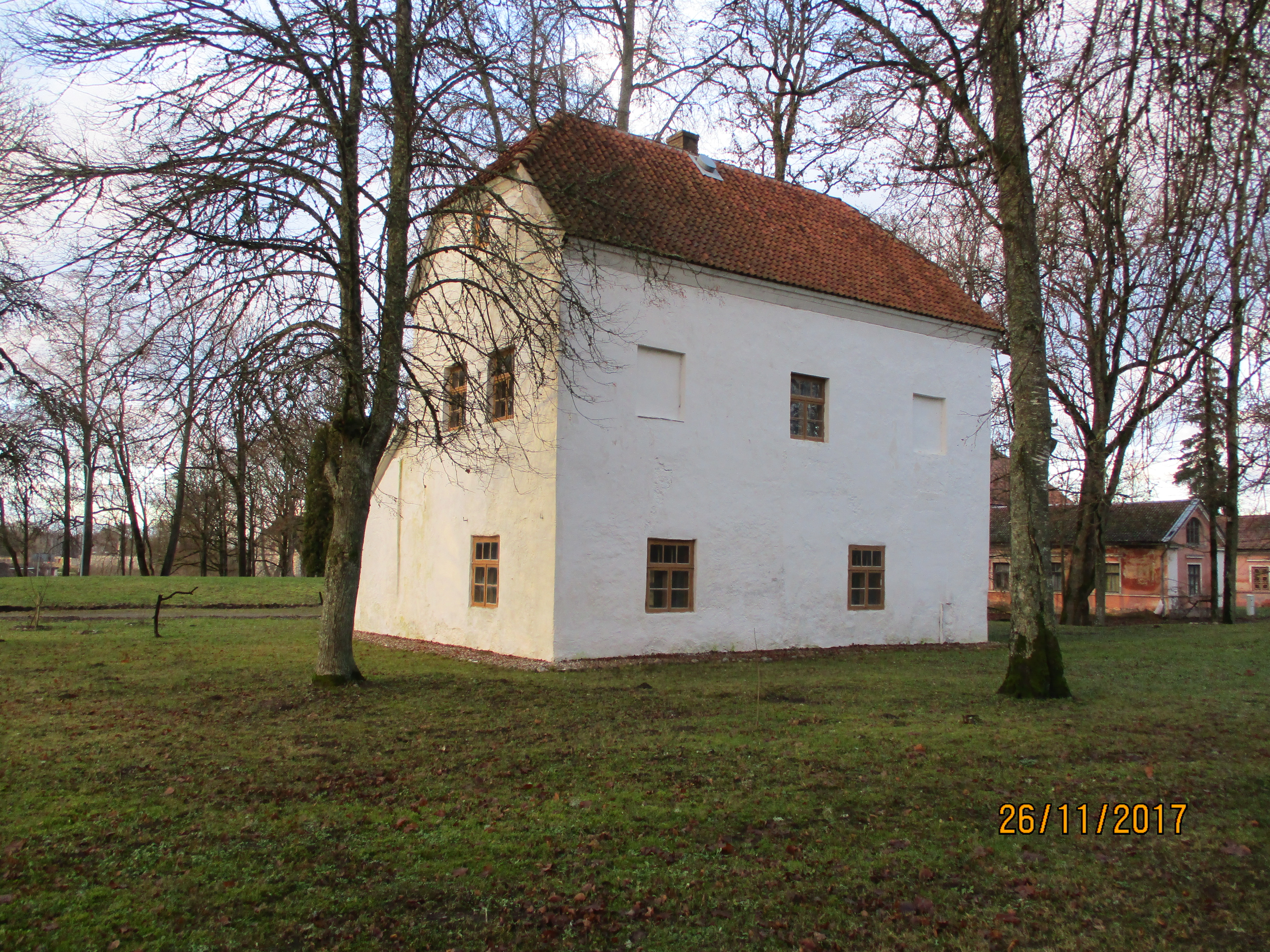 Vaade majalinnuse kaguküljele